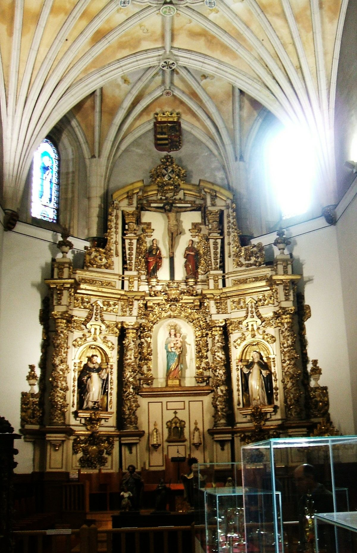 Convento de Santa Cruz (MM Dominicas), Vitoria-Gasteiz